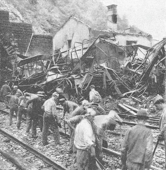 Blick gegen Tunnelportal und Wärterhaus Piano Tondo.